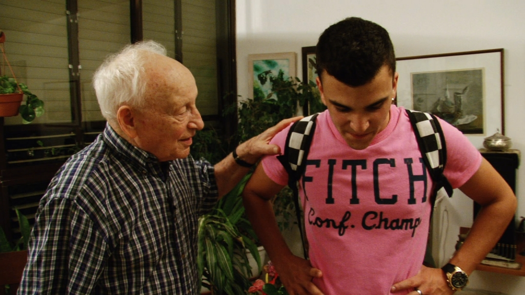 מתוך הסרט הכוח לספר